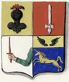 ГЕРБ